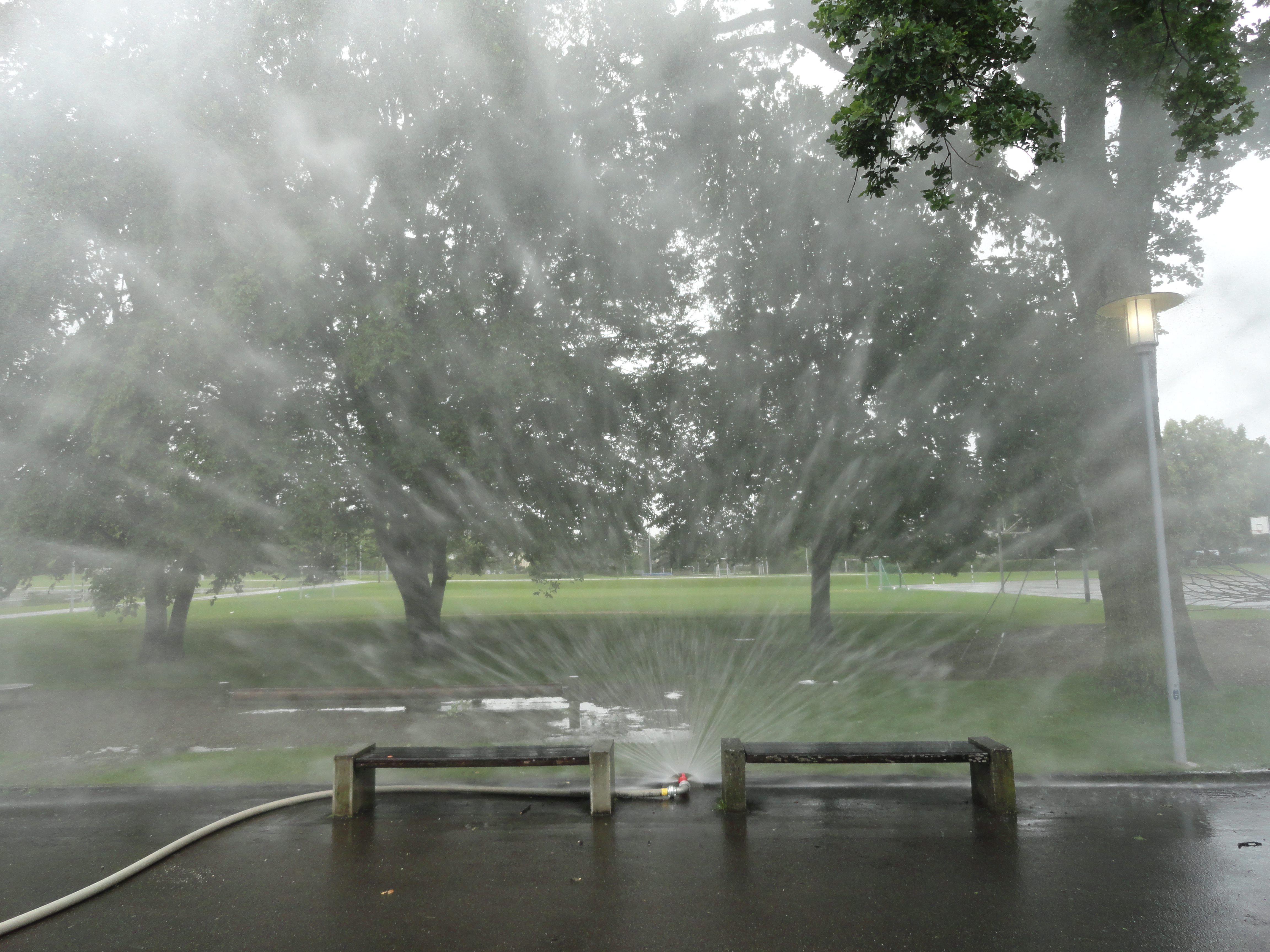 Hydroschild